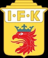 IFK Malmö or "Di Gule" (the Yellows, in Scanian), founded in 1899 and known as the mother of all "Scanian sports" in the Malmoe/Oeresund region, who used the Scanian coat of arms, the griffin, as their symbol.